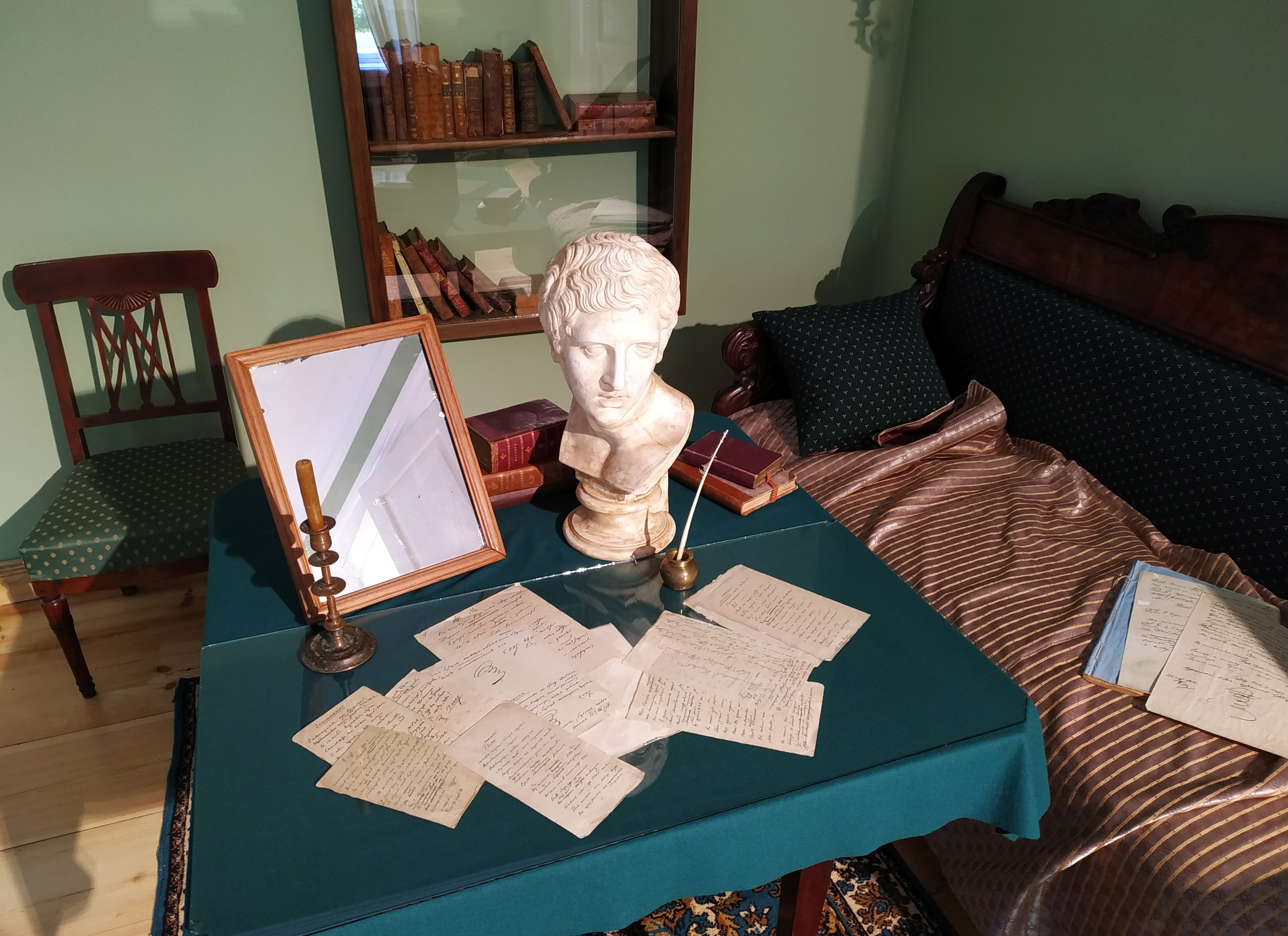 Кабинет поэта. Господский дом. Музей-заповедник А. С. Пушкина «Болдино»